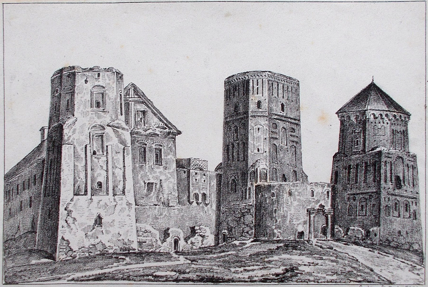 Беларуская (тарашкевіца): Мір (Mir). Замак Ільлінічаў — Радзівілаў (Illinič — Radzivił) зь перадбрам'ем. Літаграфія з малюнка Ф. М. Сабешанскага. Варшава, 1849